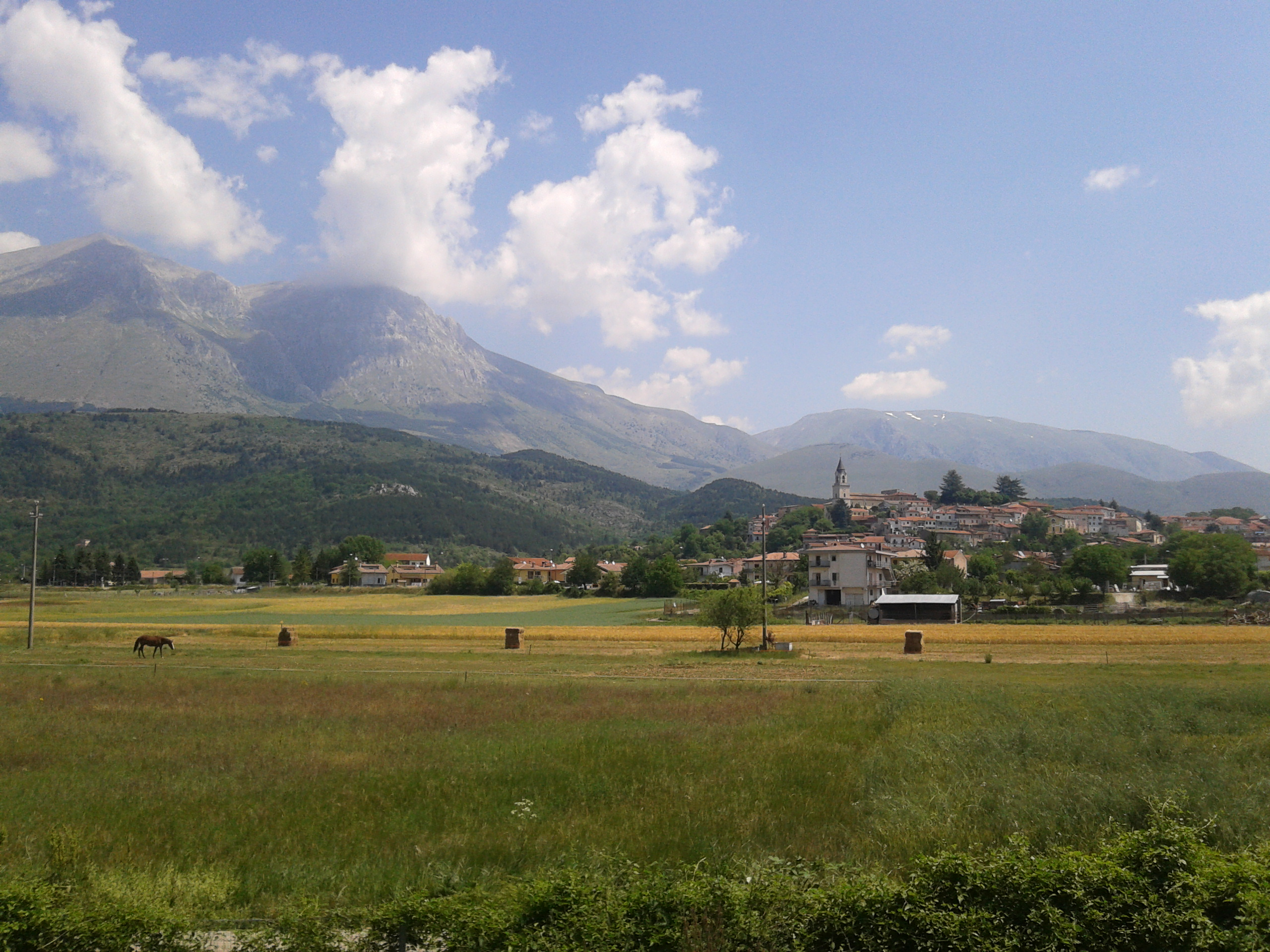 Foto panoramica di Magliano de' Marsi